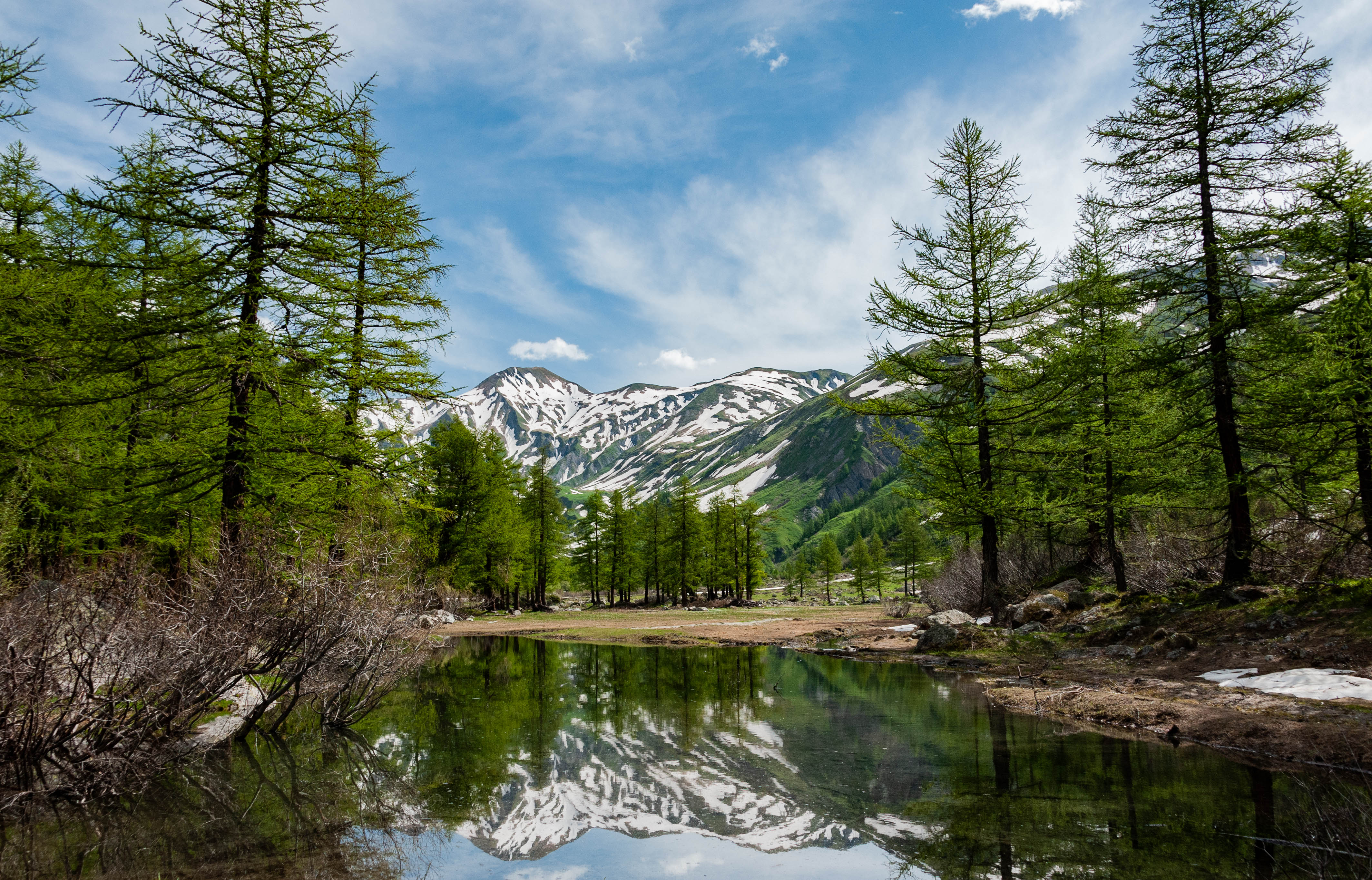 Talweg della Val Ferret (Q49966286)